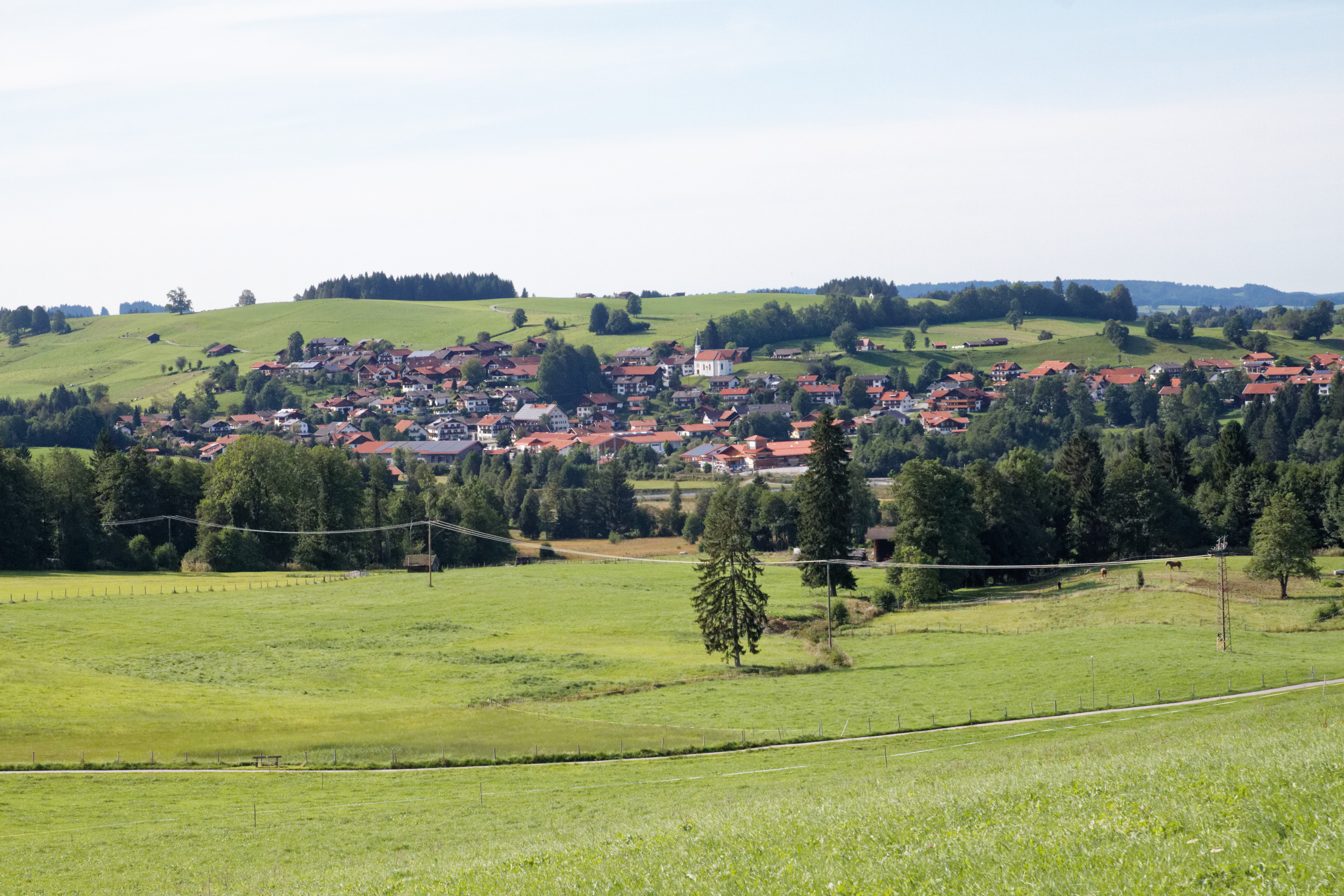 Saulgrub, von der Kraggenau aus gesehen